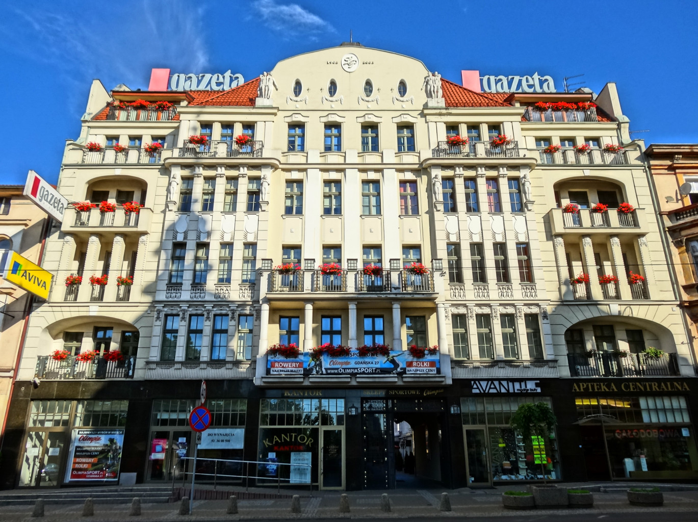 Kamienica przy ul. Gdańskiej w Bydgoszczy